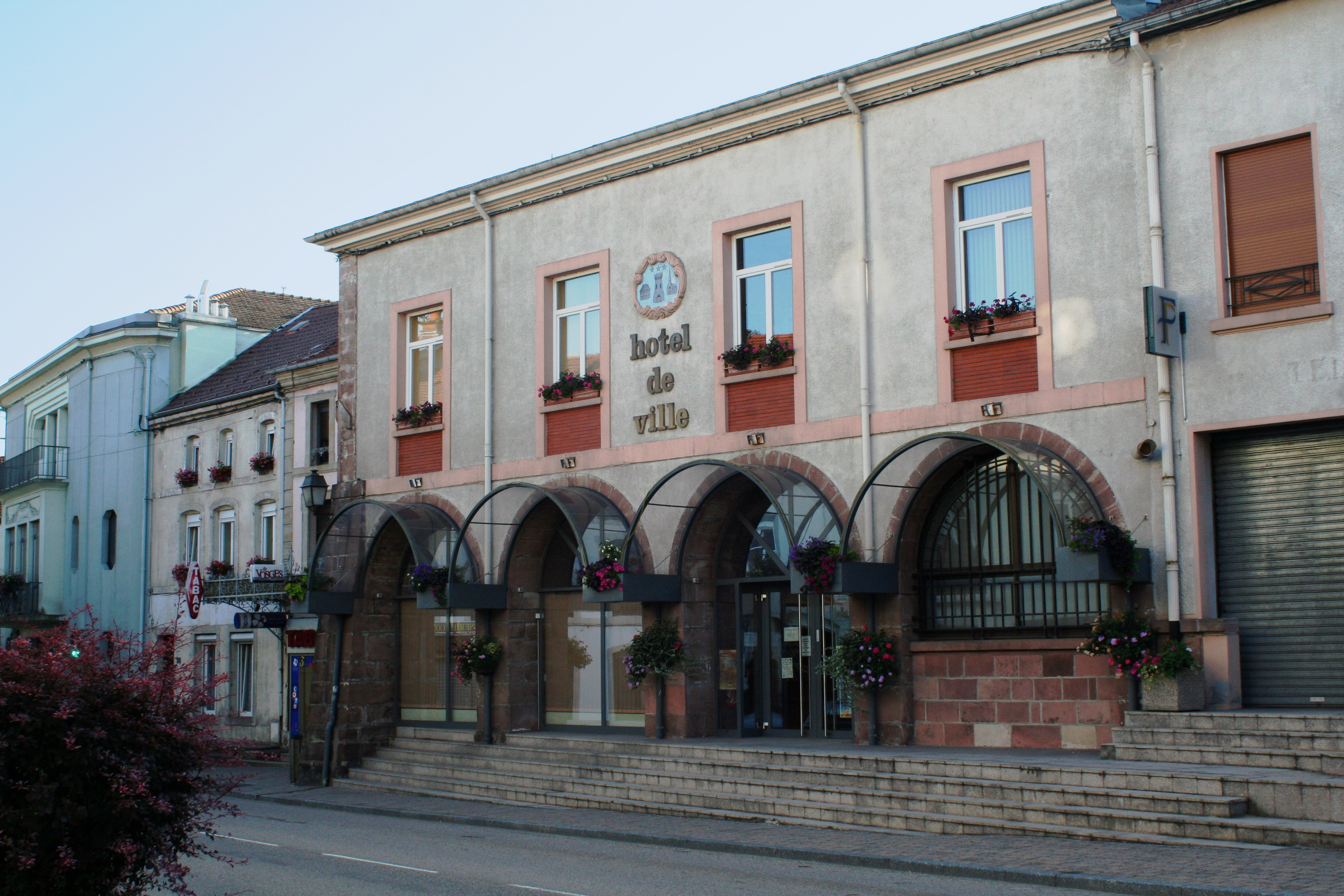 Mairie de Bruyères (Vosges)